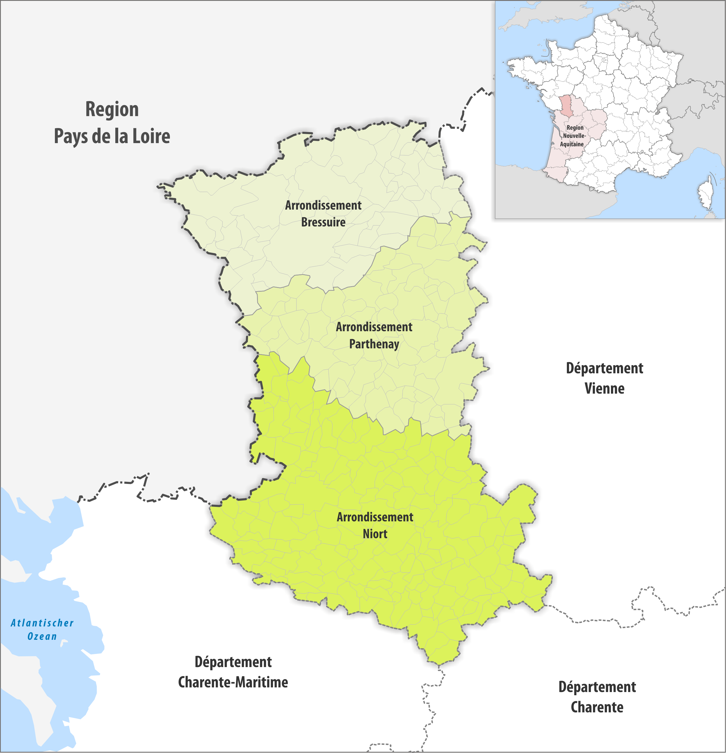 Gemeinden und Arrondissemente im Departement Deux-Sèvres